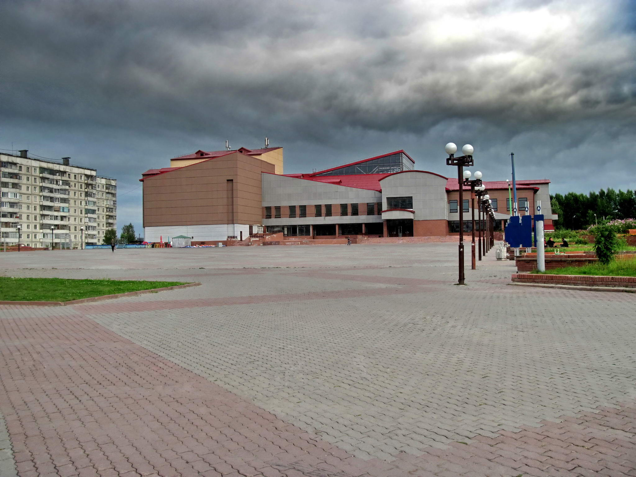 Дом культуры Металлург